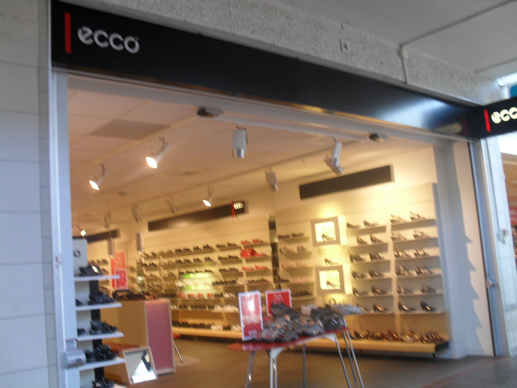 Ecco